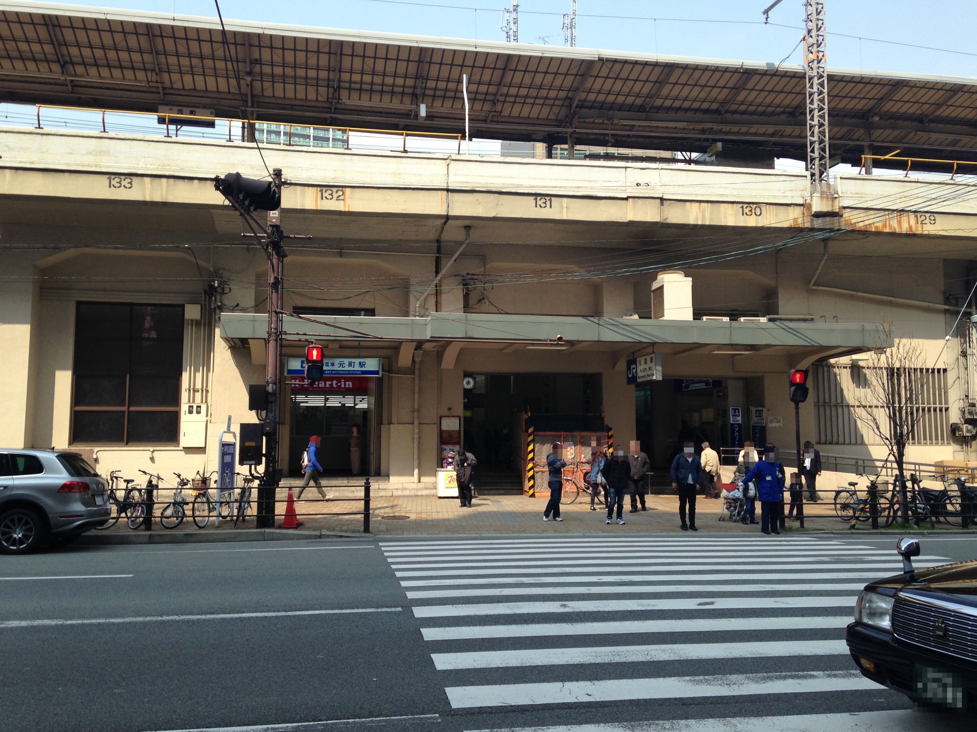 元町駅の入り口